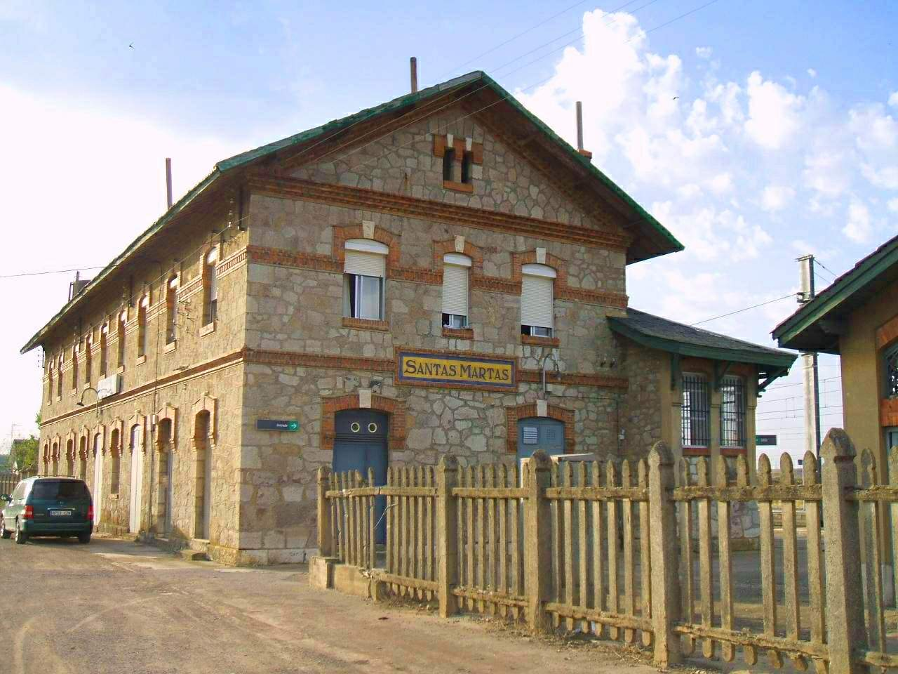 Estación de Santas Martas (Valdearcos, Santas Martas, León)